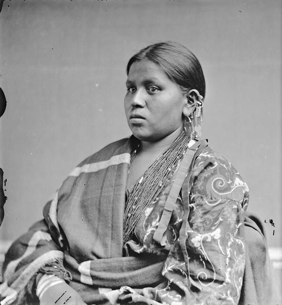 Henookeku (youngest girl) a Winnebago girl